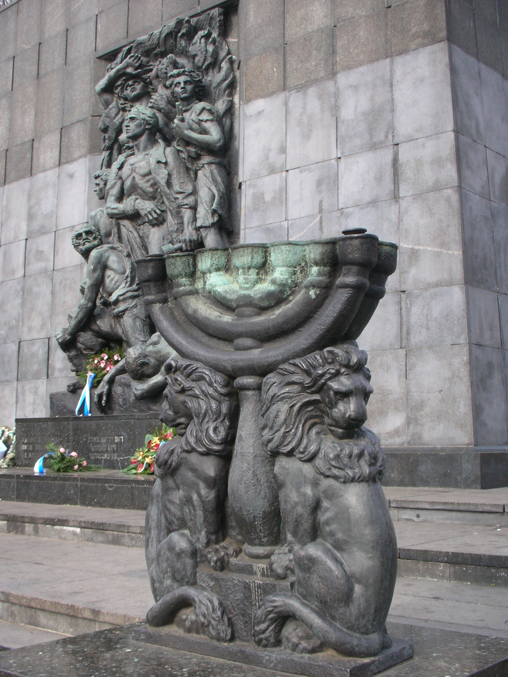 Monumento a los heroes del gueto de Varsòvia